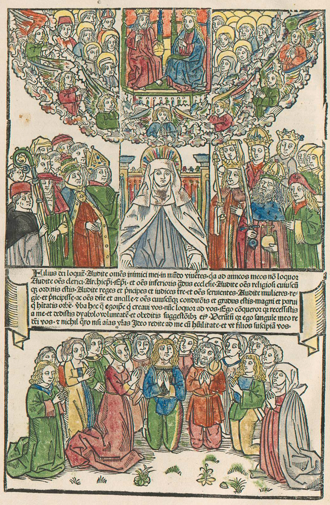 Abbildung der Brigitta